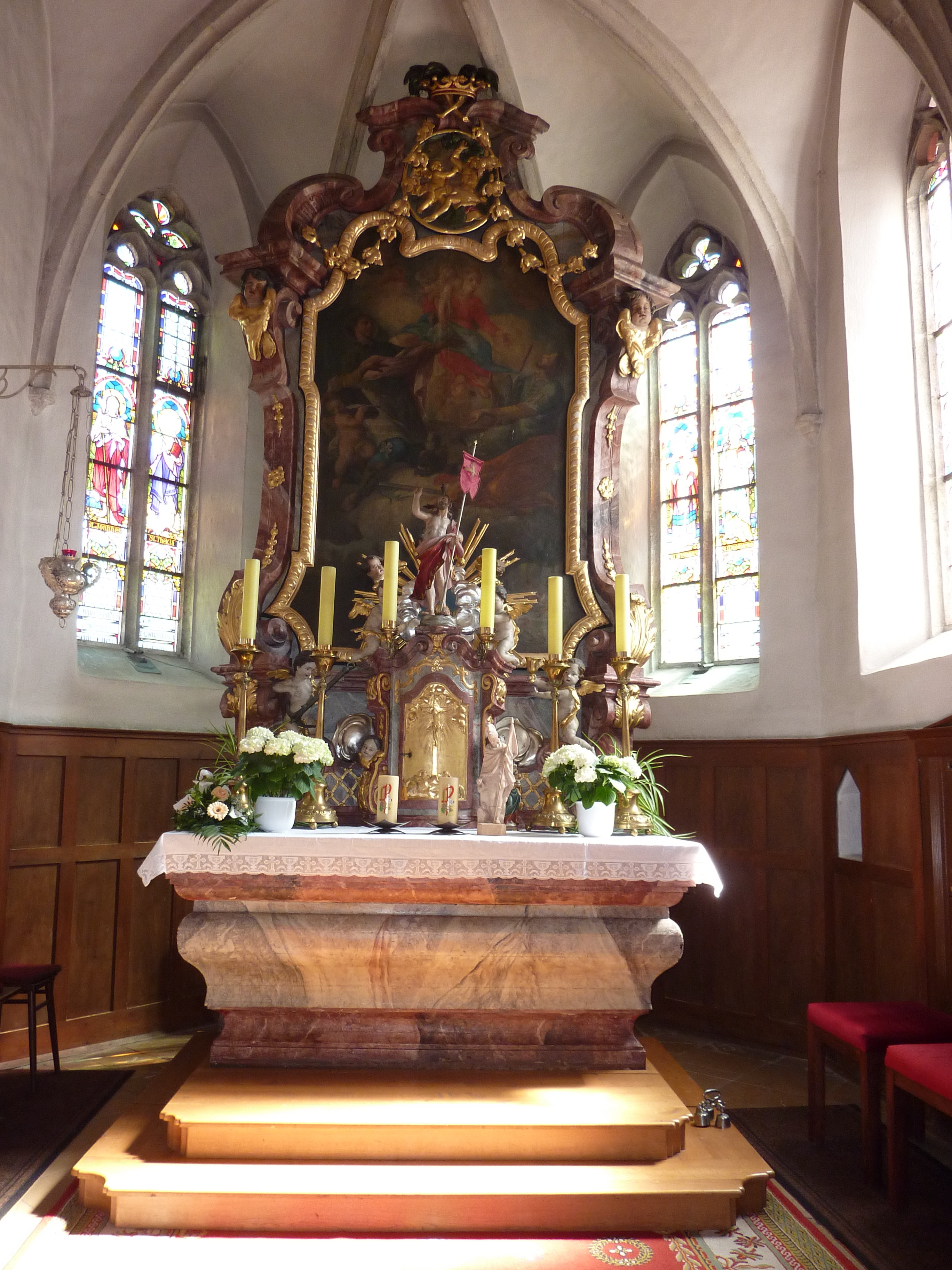 Pfarrkirche hll. Johannes und Paulus, Egelsee, Krems an der Donau, Niederösterreich - Hochaltar mit Gemälde Madonna mit Kind, flankiert von den hll. Johannes und Paulus